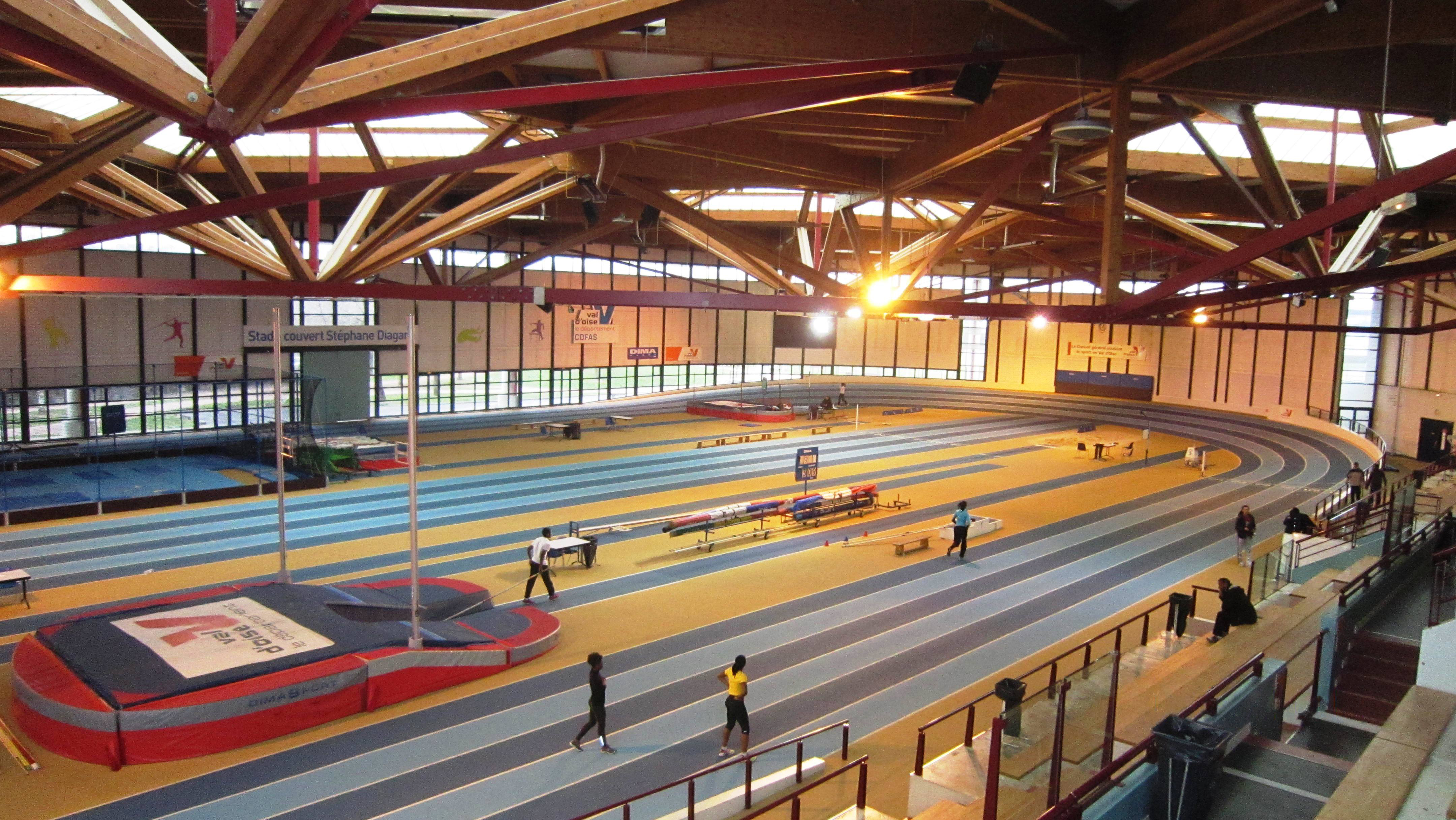 Stade Diagana au CDFAS d'Eaubonne (France)